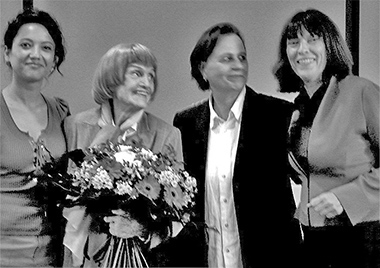 (v.l.n.r.) Madeleine Wehle, Gisela May, Rengha Rodewill und Beatrix Schmidt. Kinderklinik Josephinchen des St. Joseph Krankenhaus in Berlin-Tempelhof, anläßlich der Charity-Veranstaltung Benefiz für Spatz, 2009.